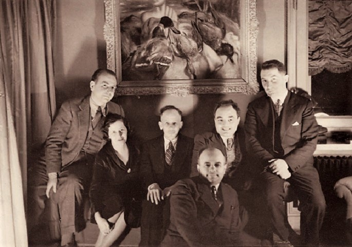 Da sinistra: Raffaele Mattioli, la moglie Lucia Mattioli, sconosciuto, Sergio Solmi e Arrigo Cajumi. In primo piano, Antonio Pescarzoli